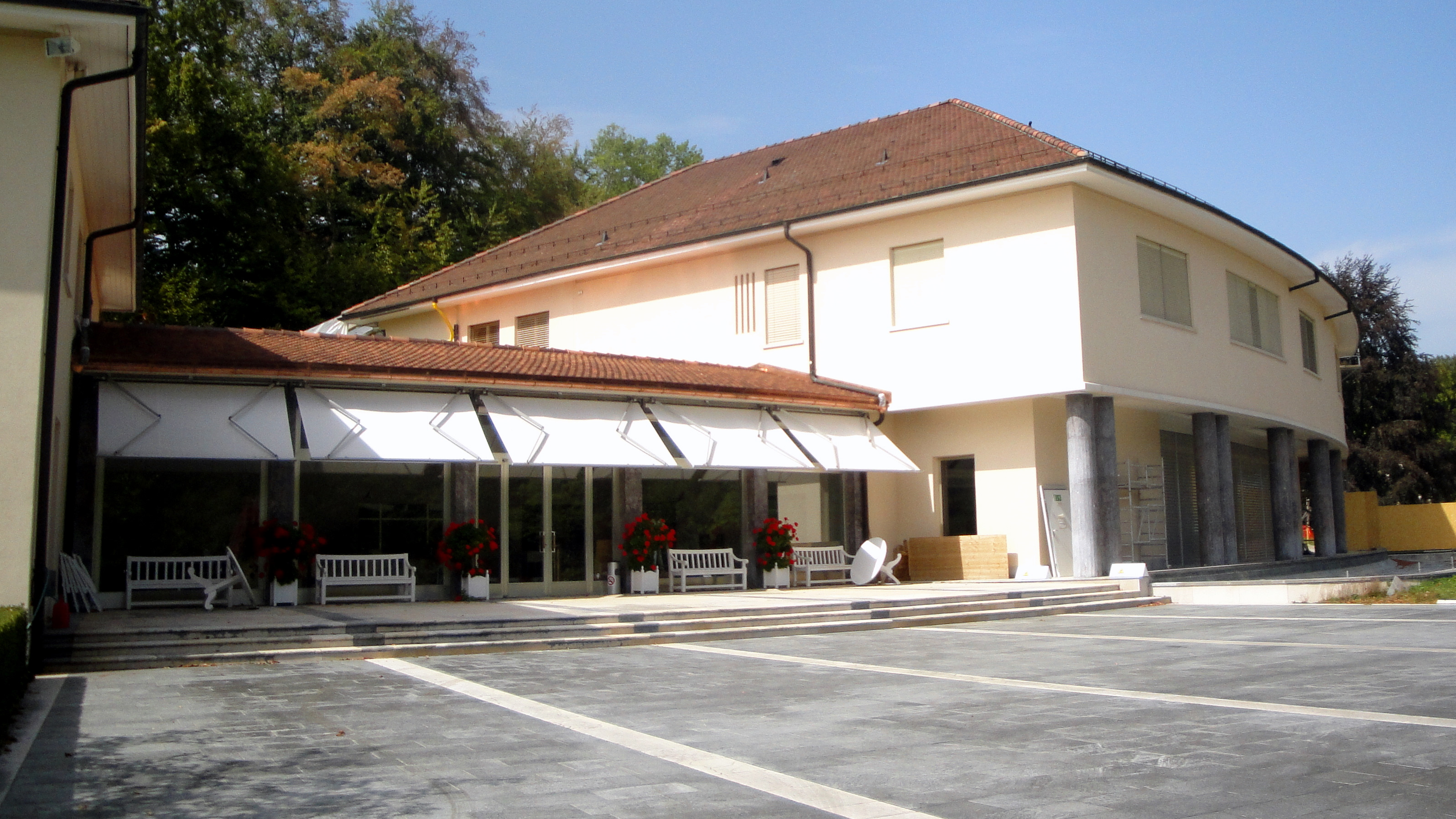 Riggisberg, Abeggstiftung